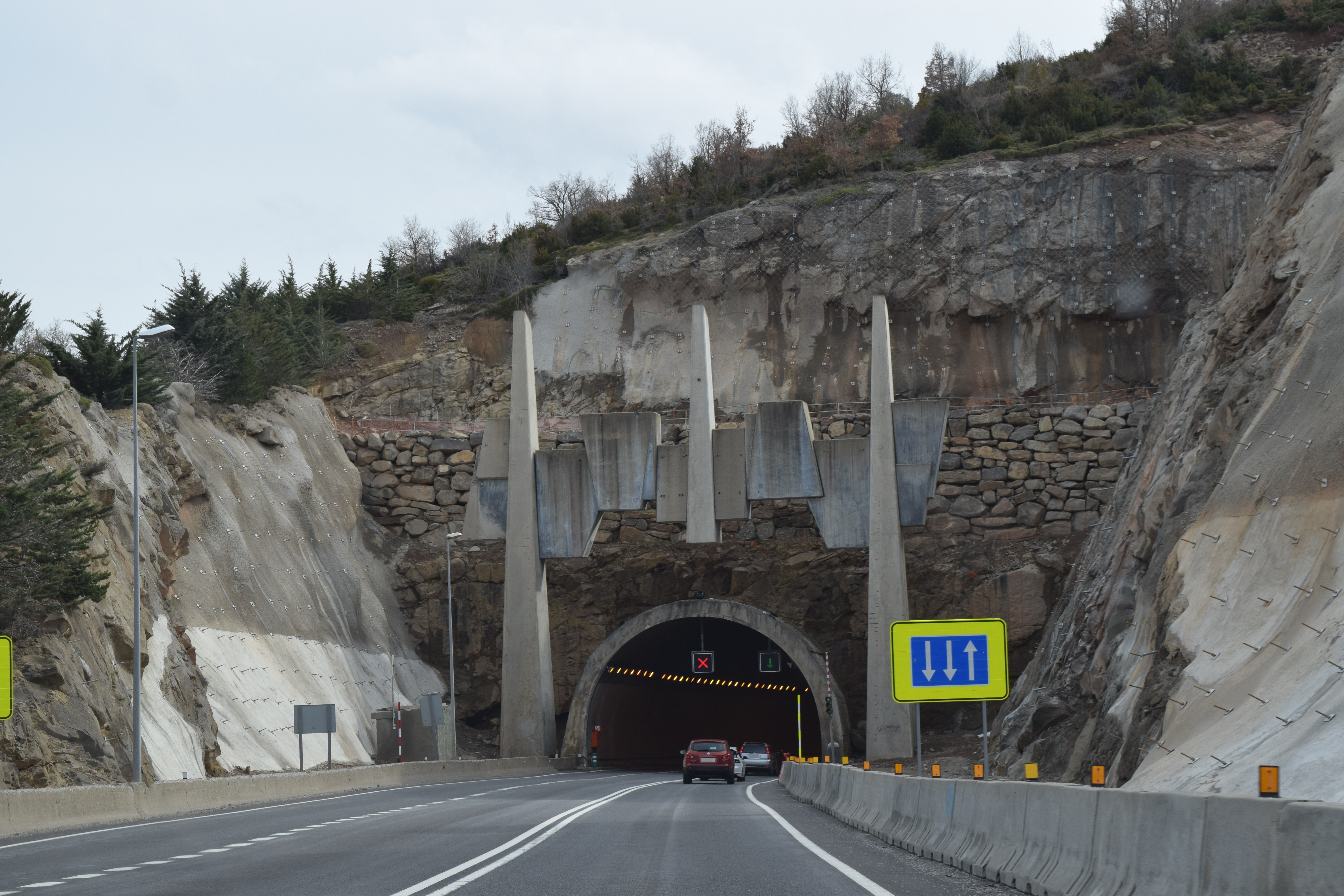 Túnel de Monrepós 1, en Arguís (Huesca). Nacional N-330.